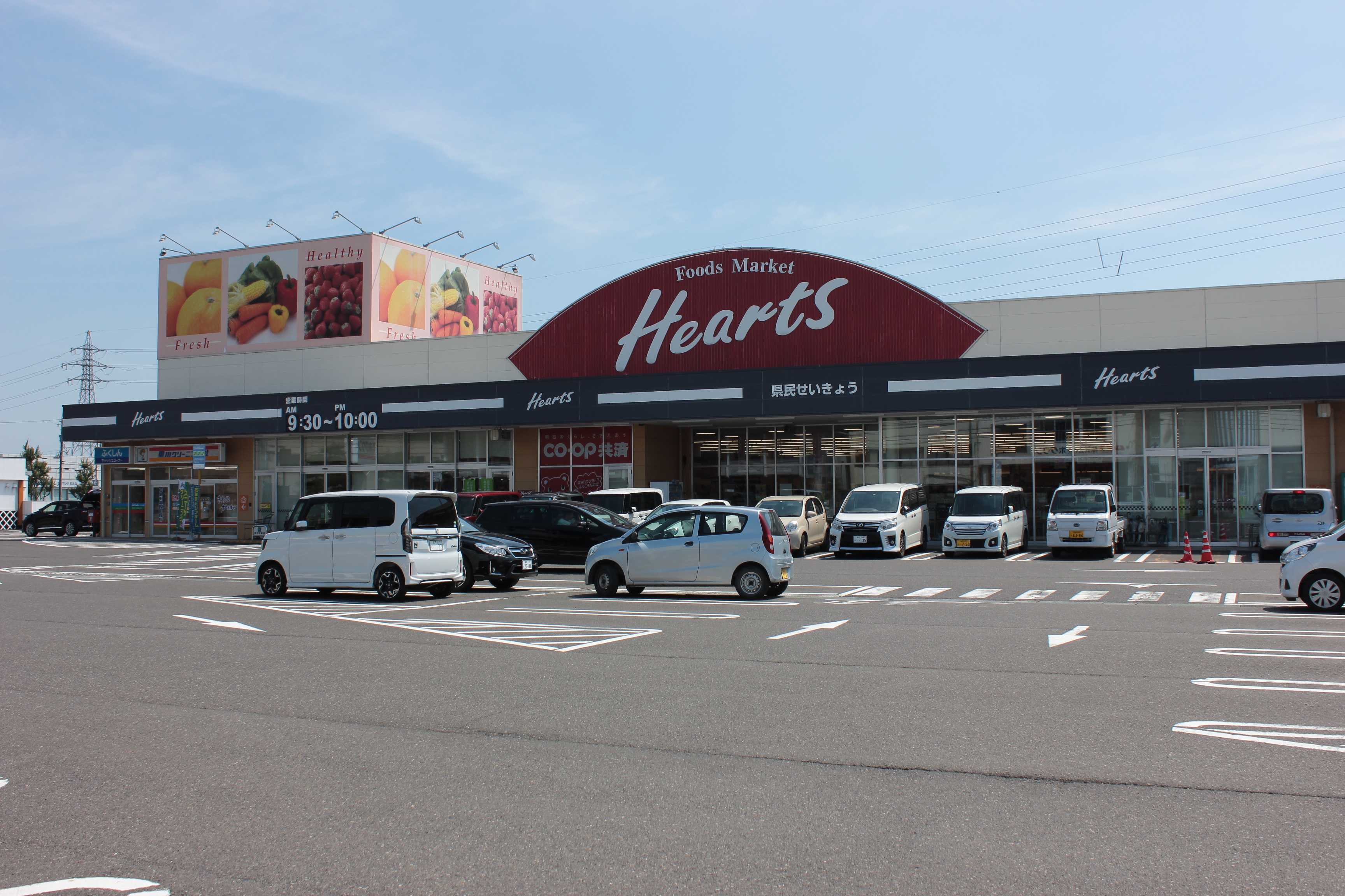 福井県民生活協同組合 ハーツたけふ店（福井県越前市） Canon EOS Kiss X5